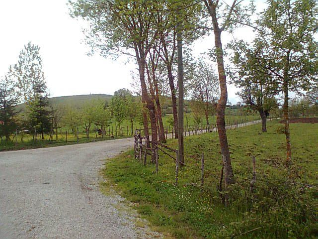 alıntı